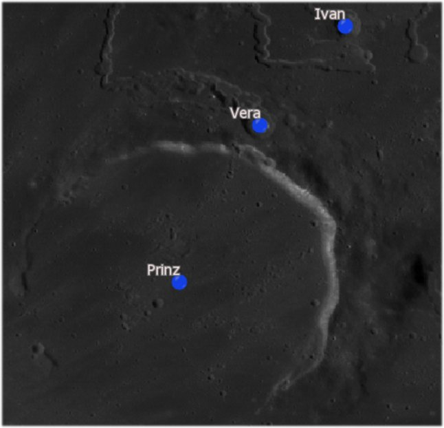 Cráteres lunares Prinz, Vera e Ivan. (Imagen LRO)